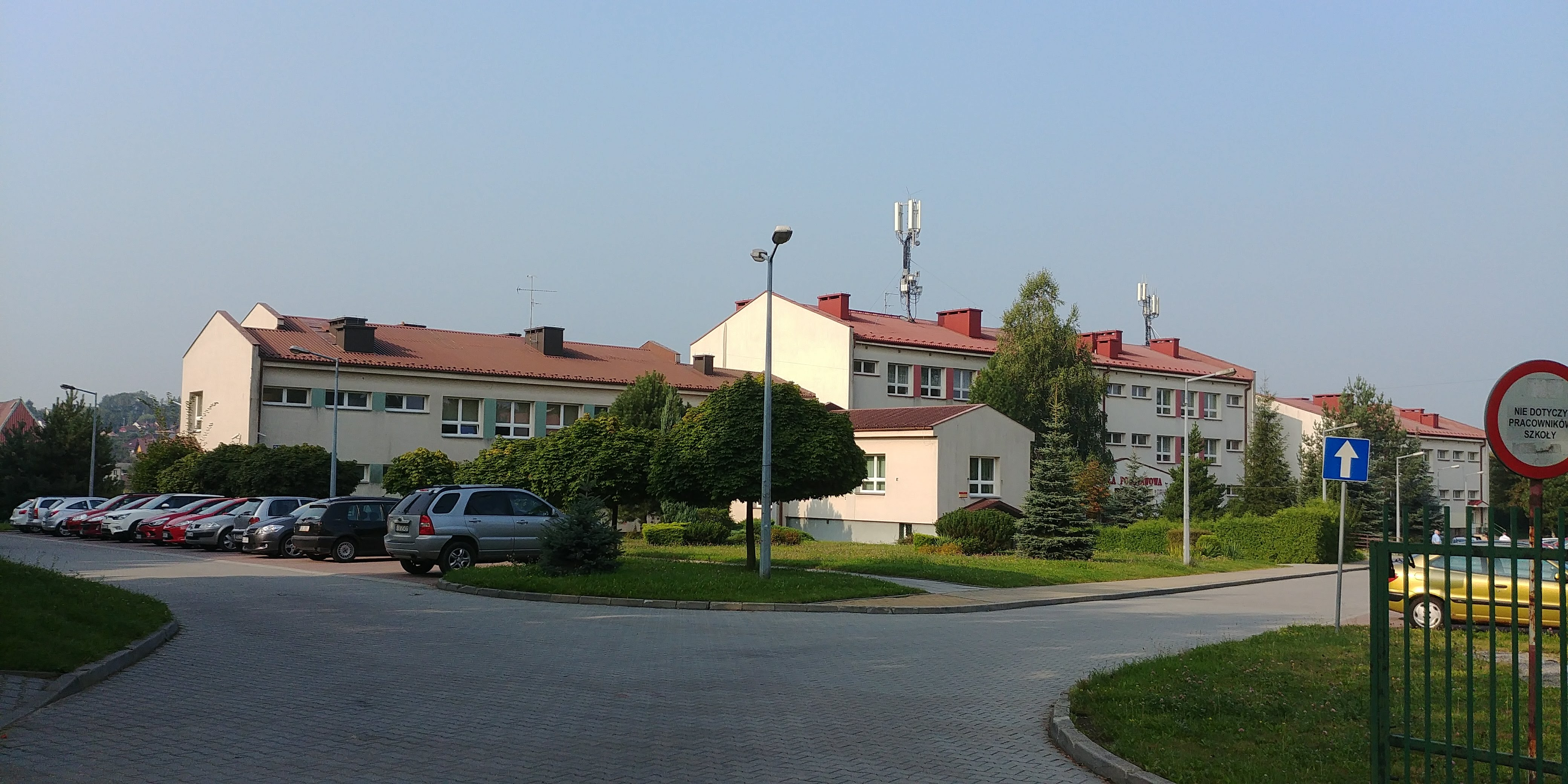 Publiczna Szkoła Podstawowa nr 4 i II Liceum Ogólnokształcące w Bochni.